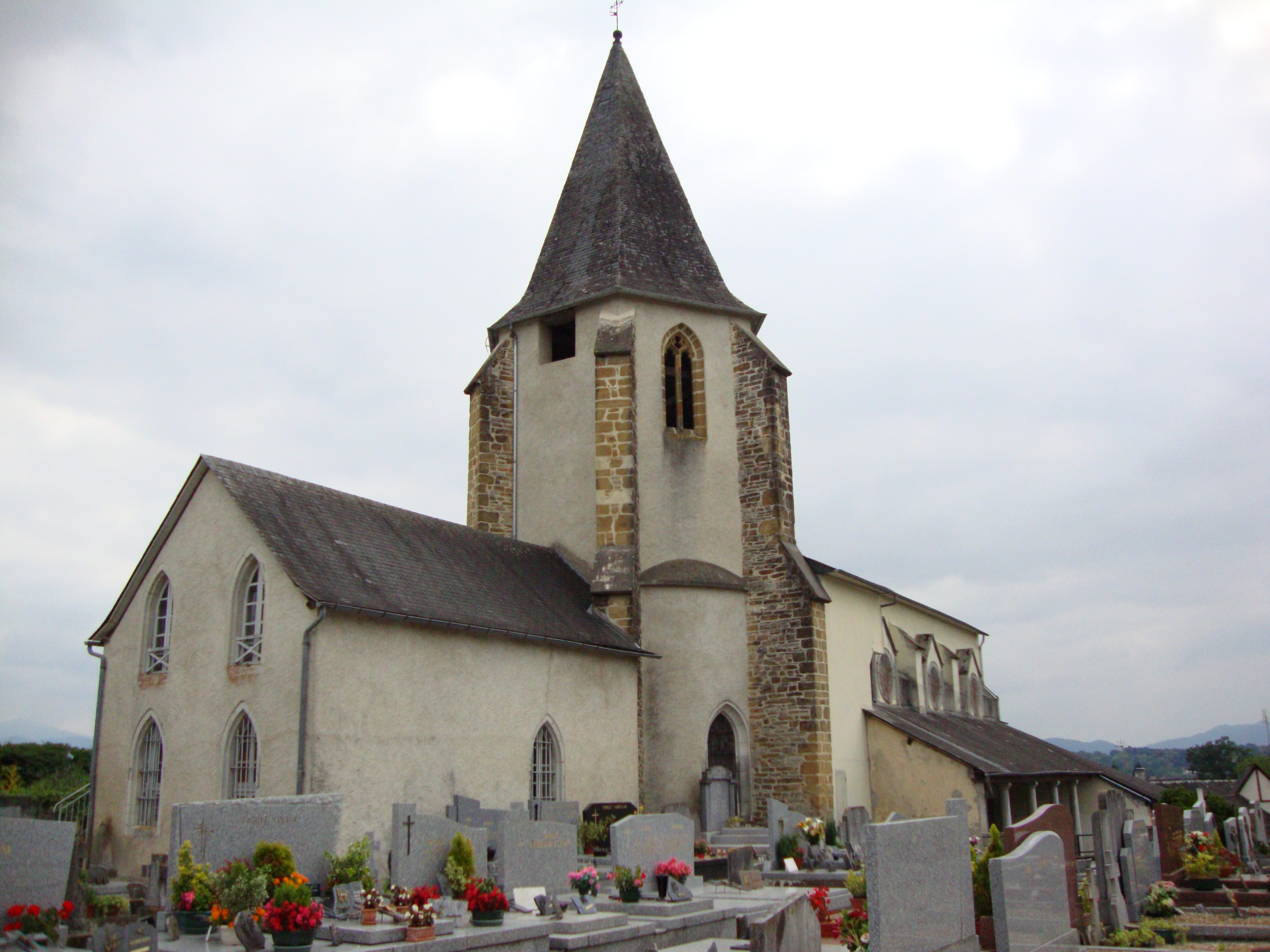 Ledeuix (Pyr-Atl, Fr) church